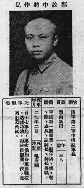 抗戰軍人忠烈錄第一輯中的烈士遺像